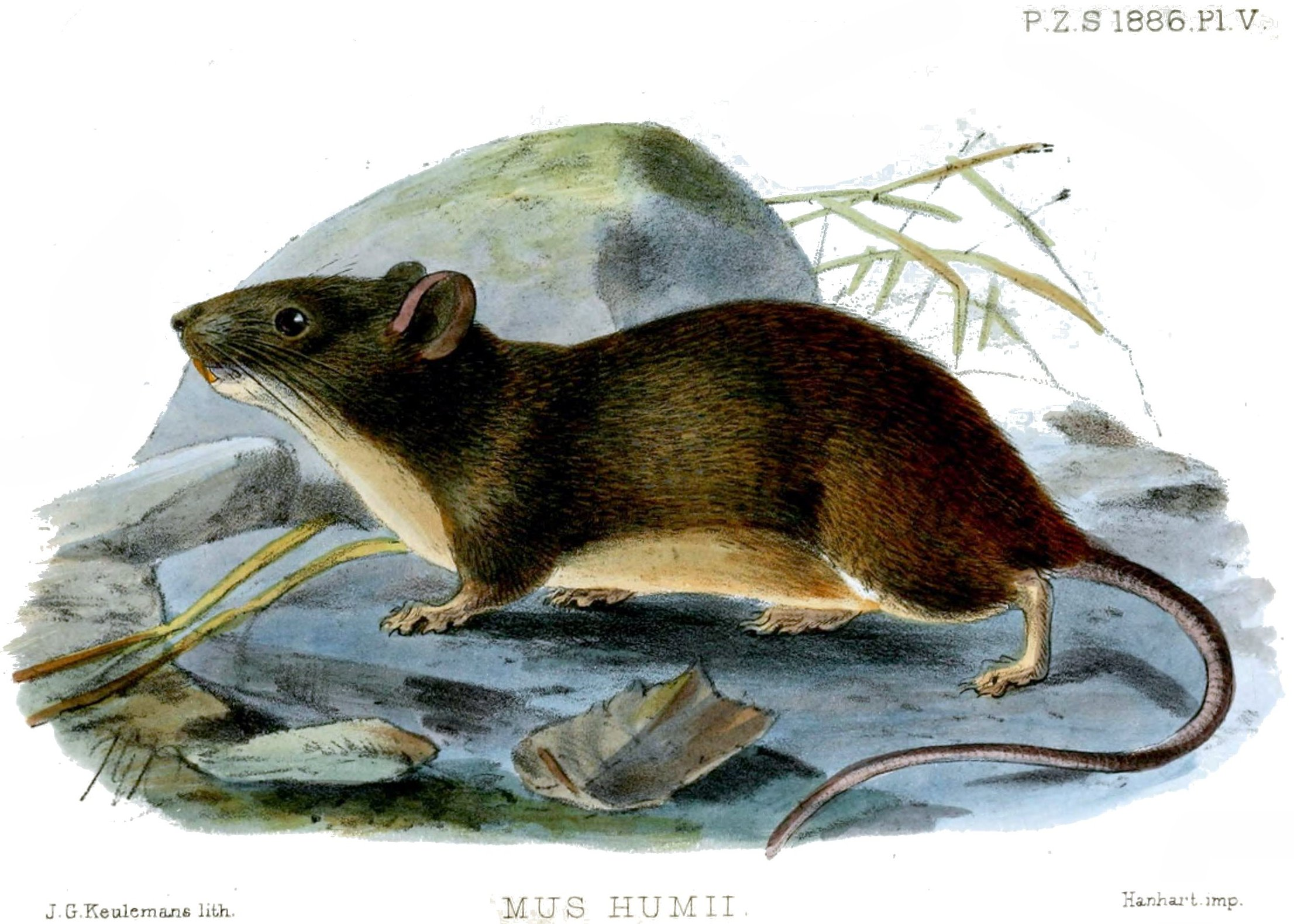 Mus humii = Hadromys humei